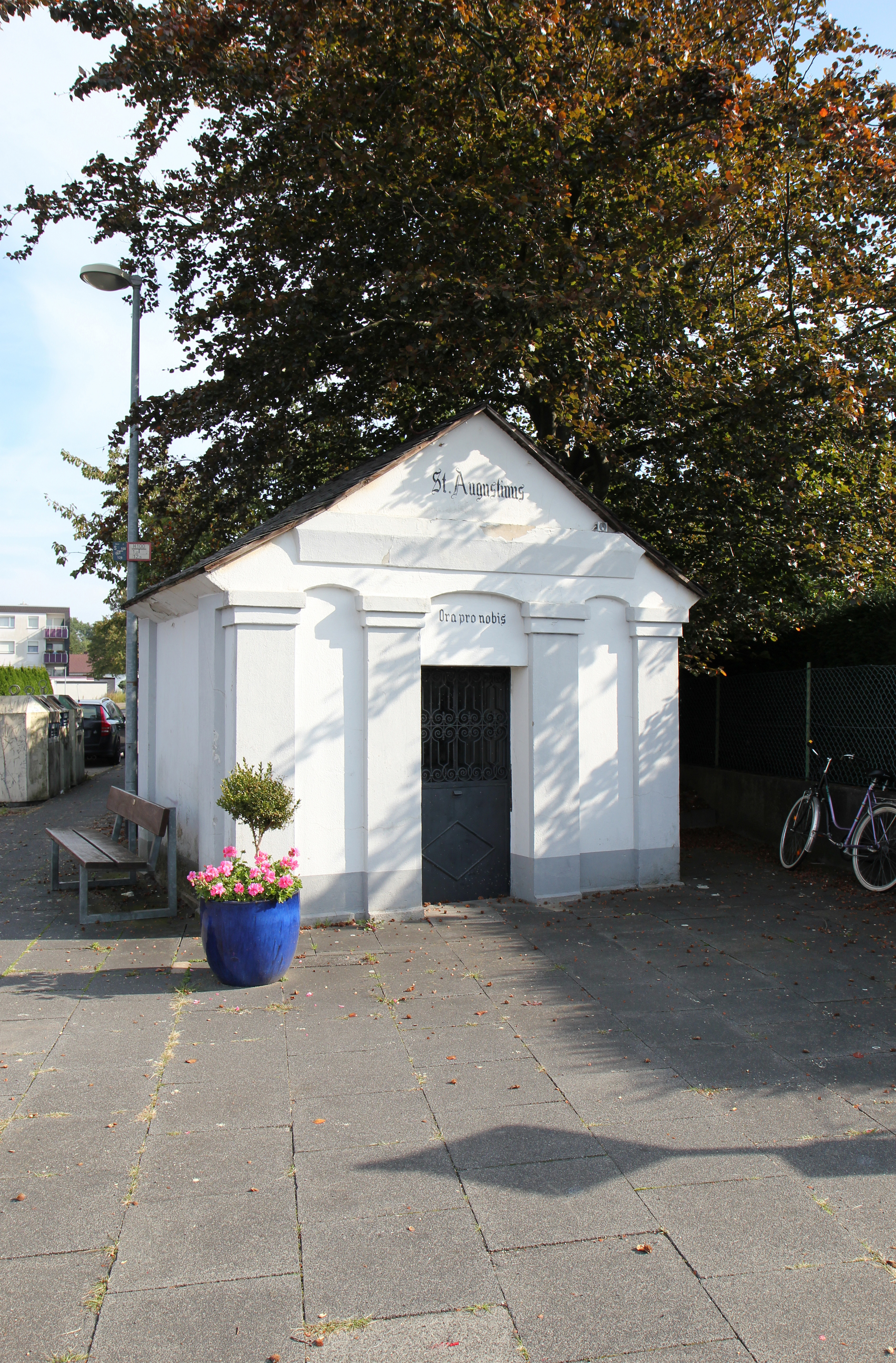 Erftstadt-Kierdorf, Ortseingang Friedrich-Ebert-Straße, Wegekapelle Sankt_Augustinus